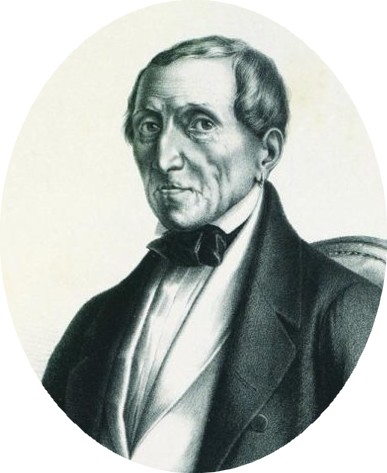 Jan Nepomuk Kaňka ml. (1772 - 1865), Český právník a hudební skladatel.